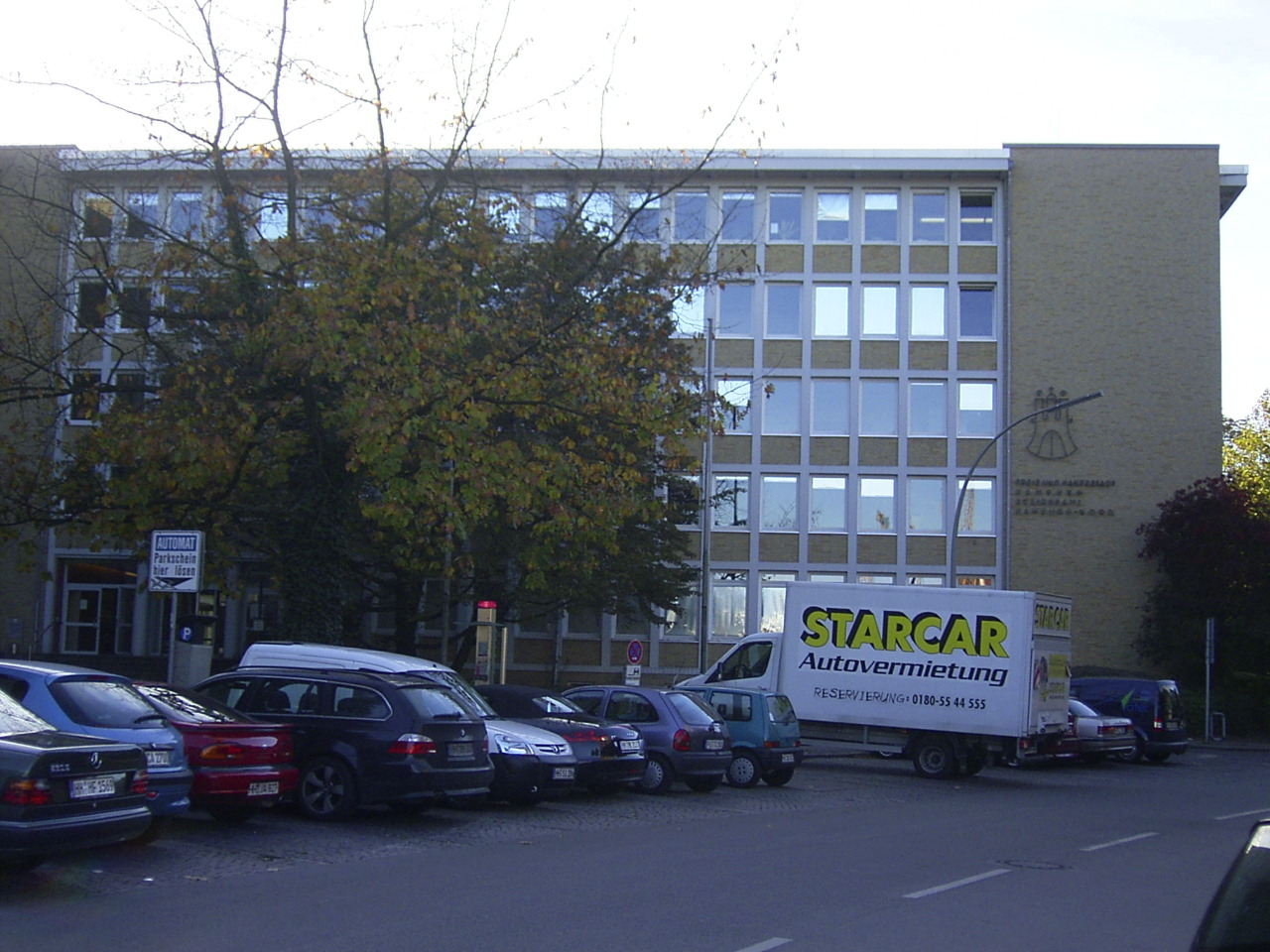 Das Bezirksamt Hamburg-Nord ist die Verwaltungszentrale des gleichnamigen Hamburger Verwaltungsbezirks. Das Gebäude in der Kümmellstraße in Eppendorf wurde 1953 bis 1959 nach Plänen von Paul Seitz erbaut.